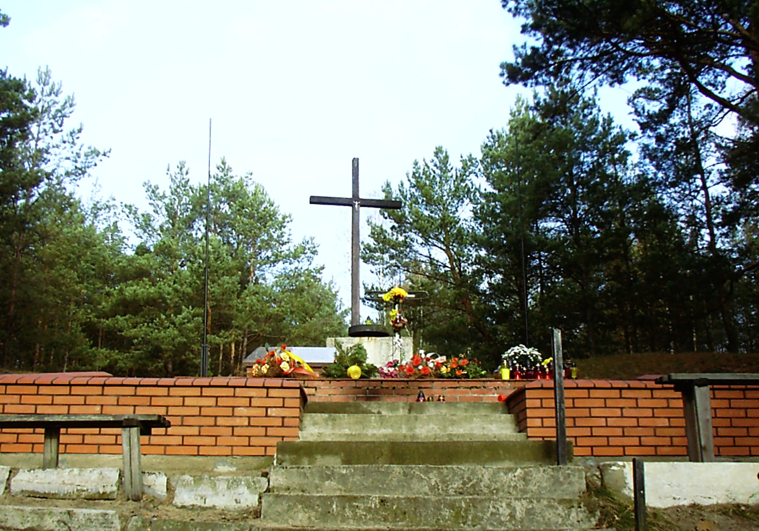 Morzewo, Miejsce Pamięci Narodowej 1939